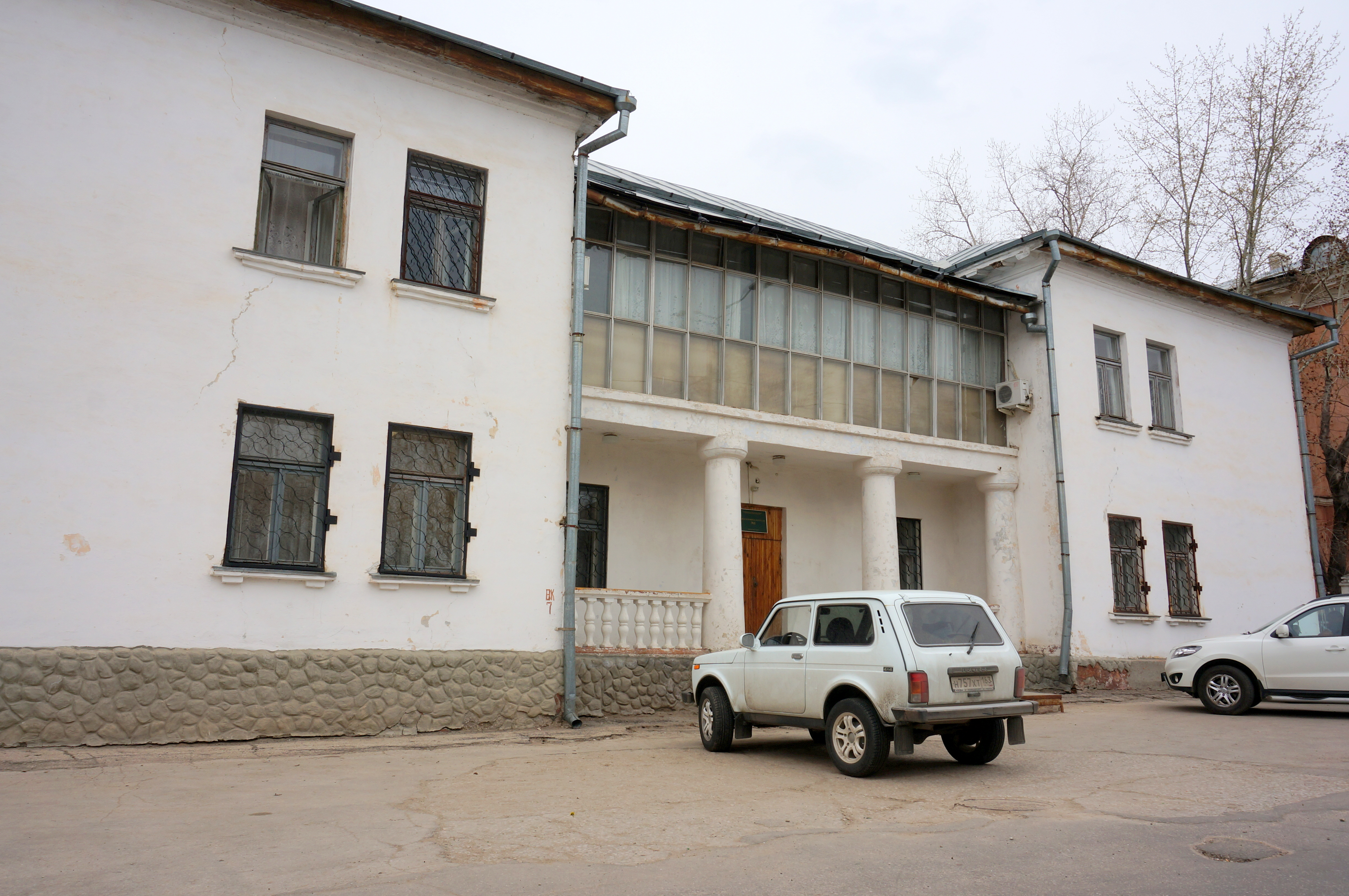 Ул. Шлюзовая 3, Тольятти, Россия. Здание прямоугольной формы, построено в 1957 как детский сад на 100 мест по проекту архитектора И. Г. Бурова. Главный фасад выходит на улицу Шлюзовая, вход оформлен четырьмя колоннами по высоте первого этажа. Сейчас - детская школа искусств